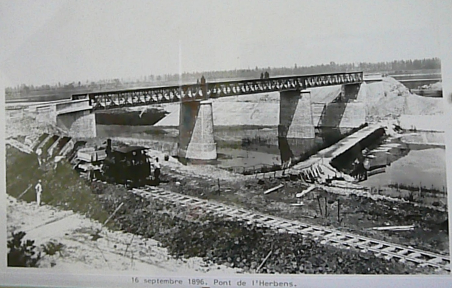 Construction du pont d'Herbens en 1896.